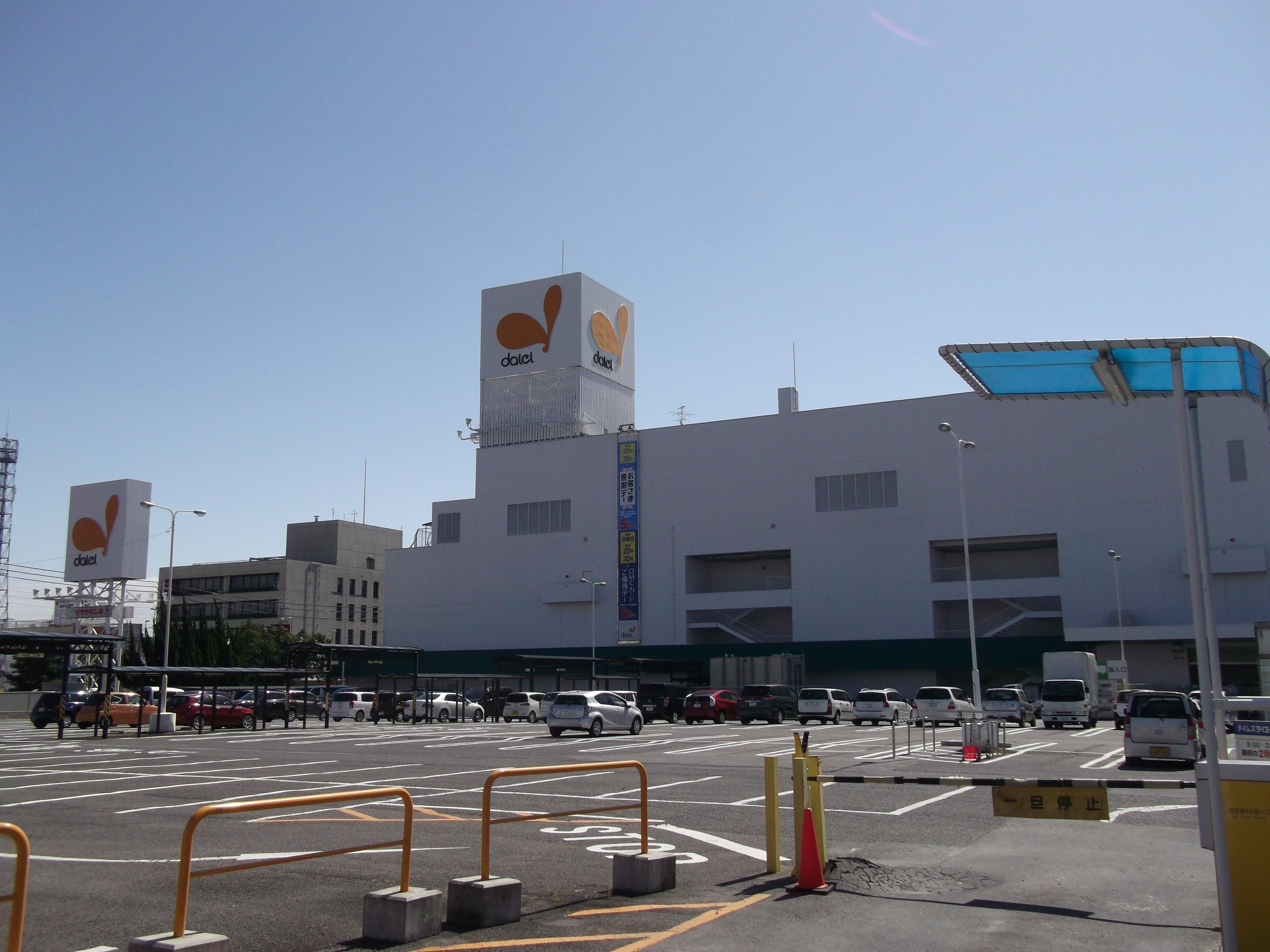 名古屋市北区織部町のダイエー上飯田店を北側公道より撮影